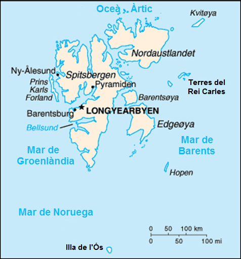 Mapa en català de l'arxipèlag de Svalbard, Noruega.